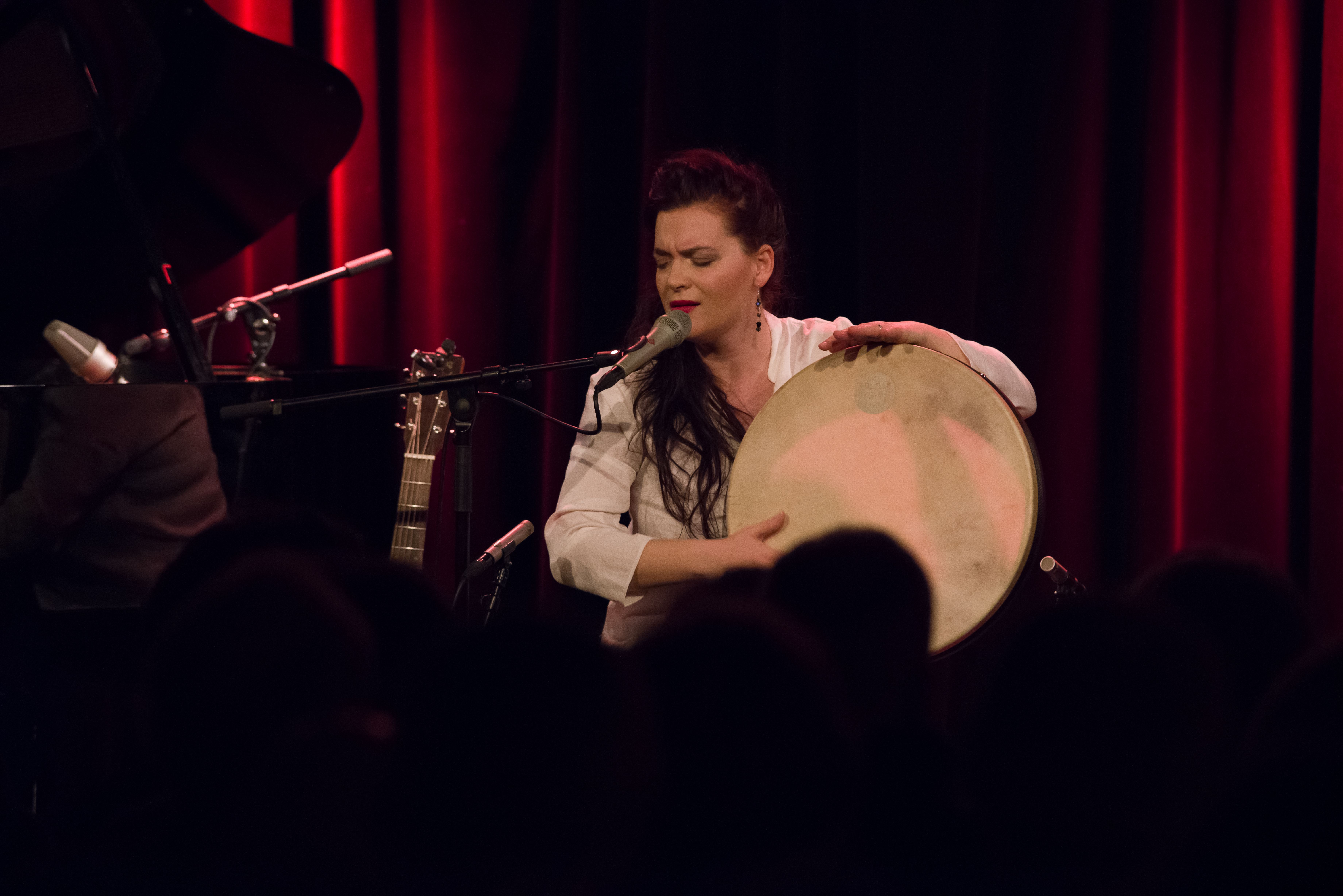 Elina Duni spielt Tamburin während eines Konzerts in Biel, Schweiz.